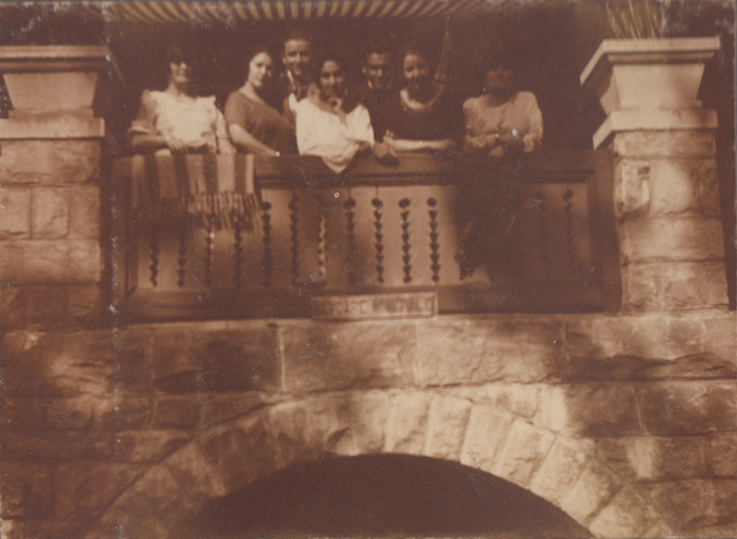 Fort St. George